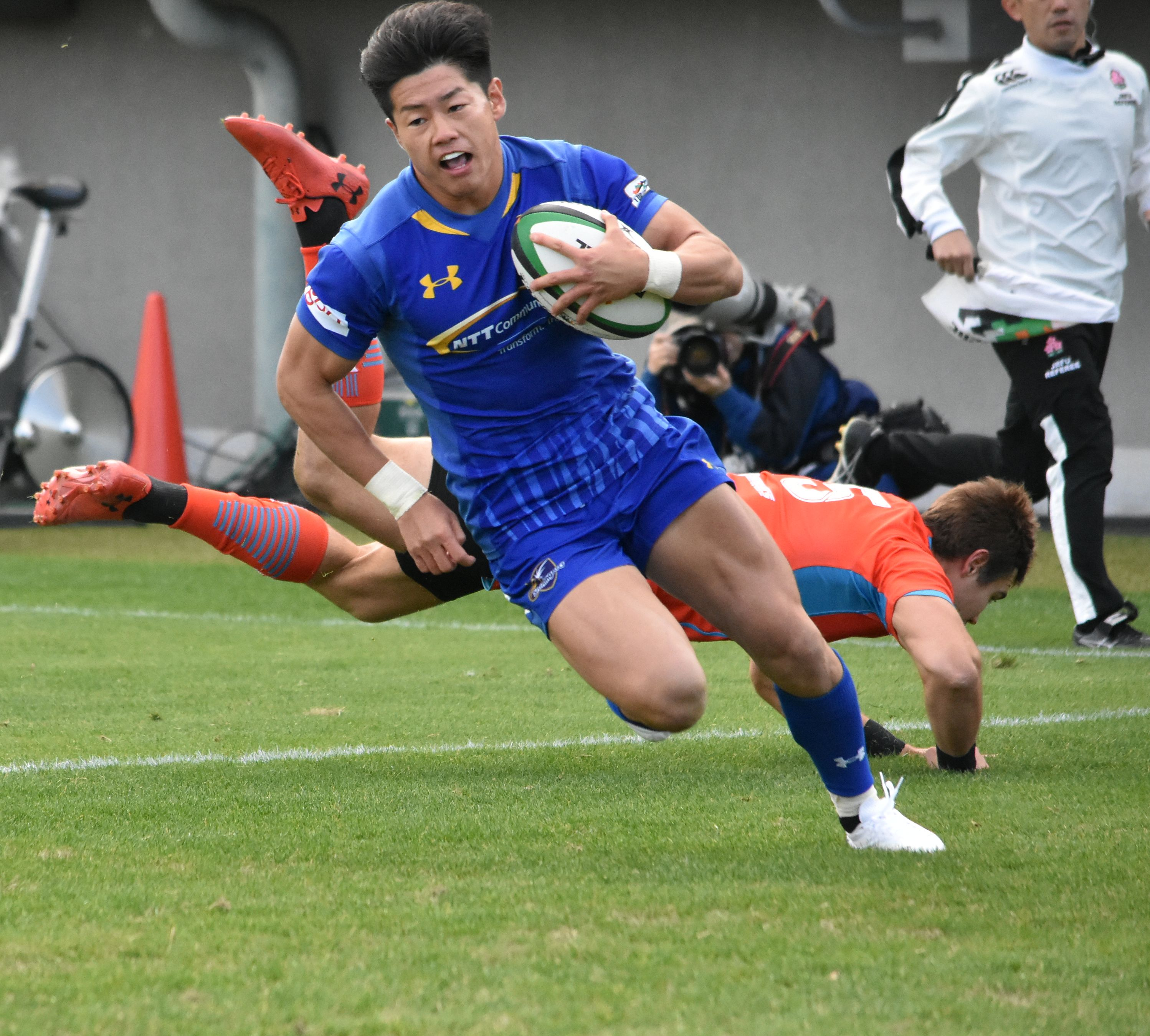 トップリーグ 石井 魁